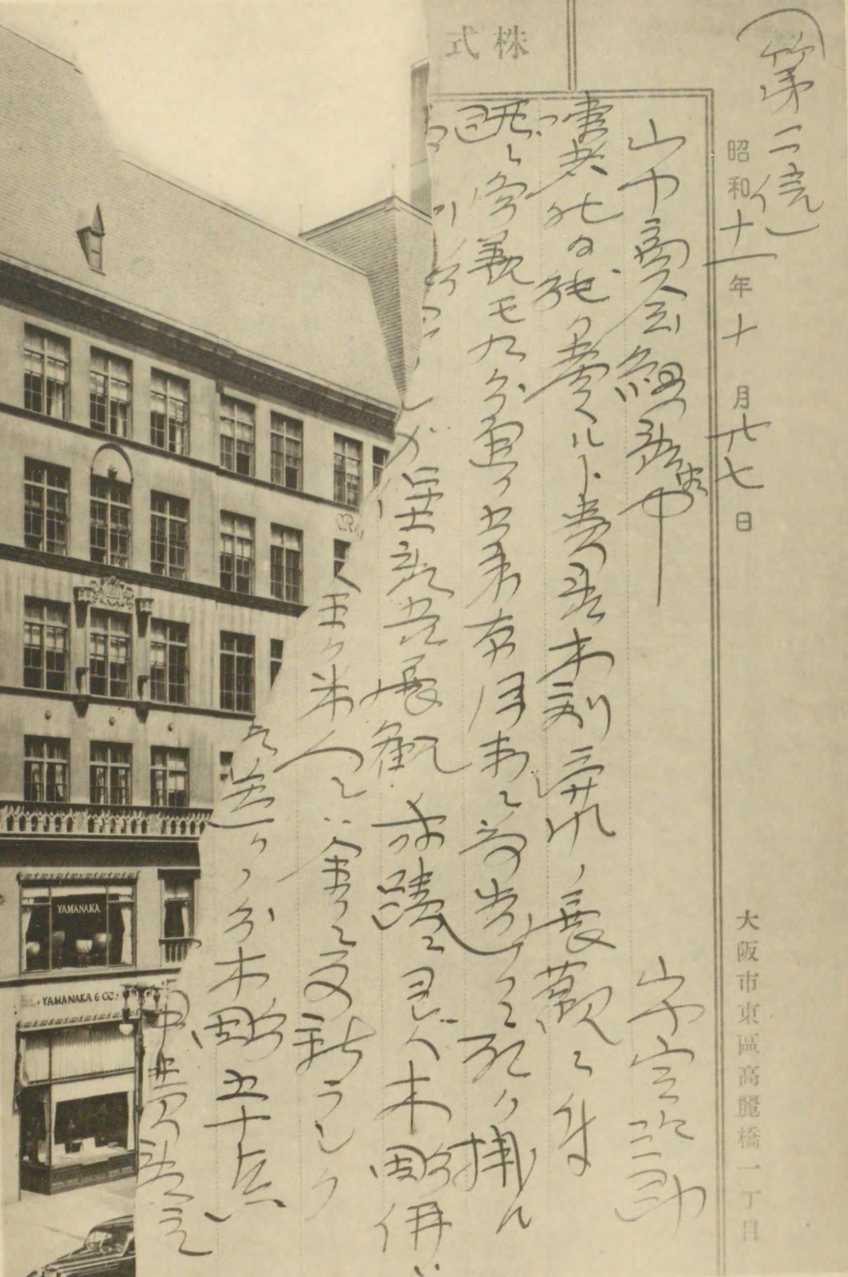 山中定次郎の絶筆 永眠3日前 ニューヨーク支店宛通信の一節とニューヨーク支店ビルディング